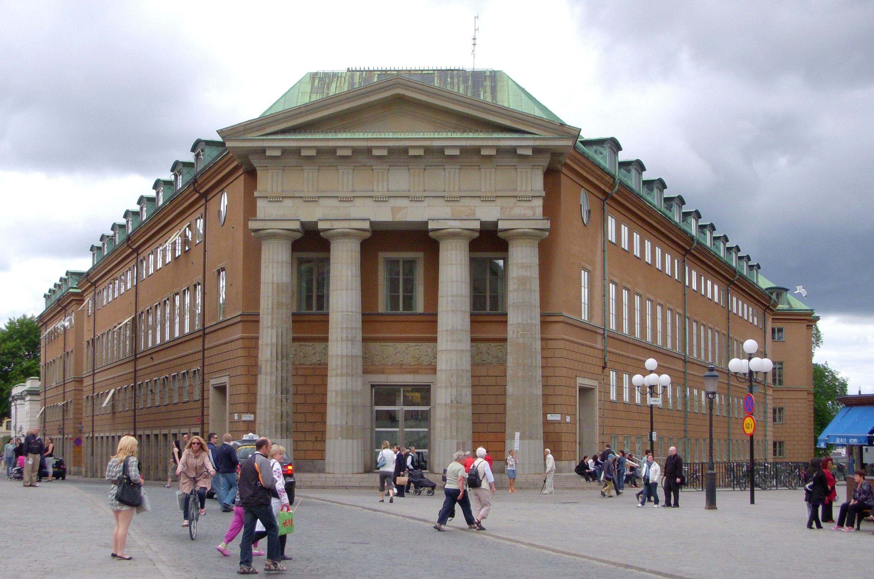 Kanslihuset i Stockholm, fasad mot Mynttorget